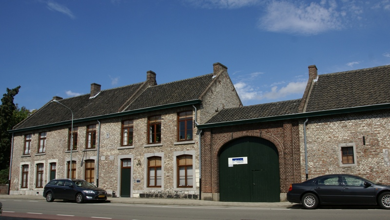 Rijksmonument 28074 - Wethouder van Caldenborghlaan 34, Maastricht.